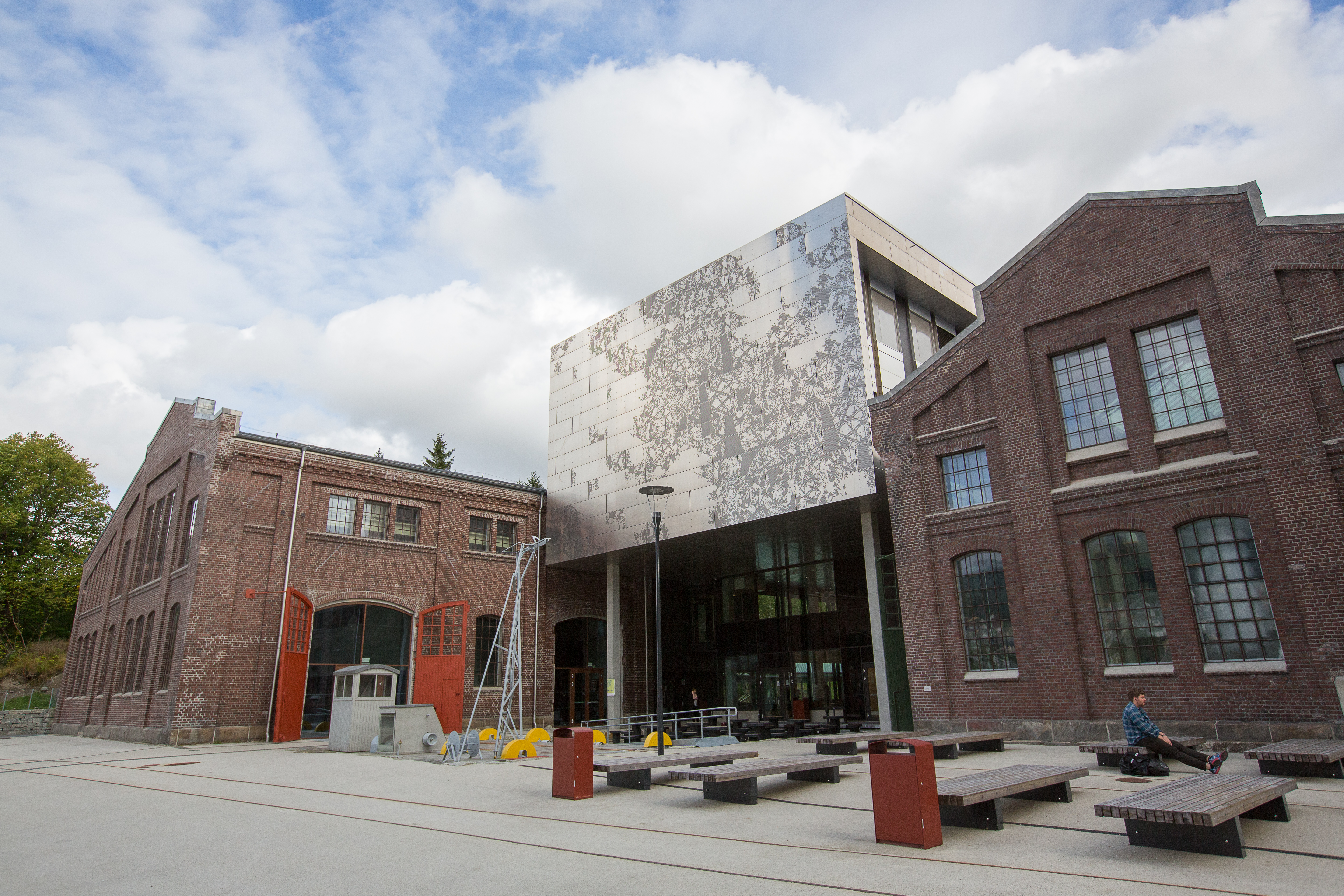 Campus Kronstad